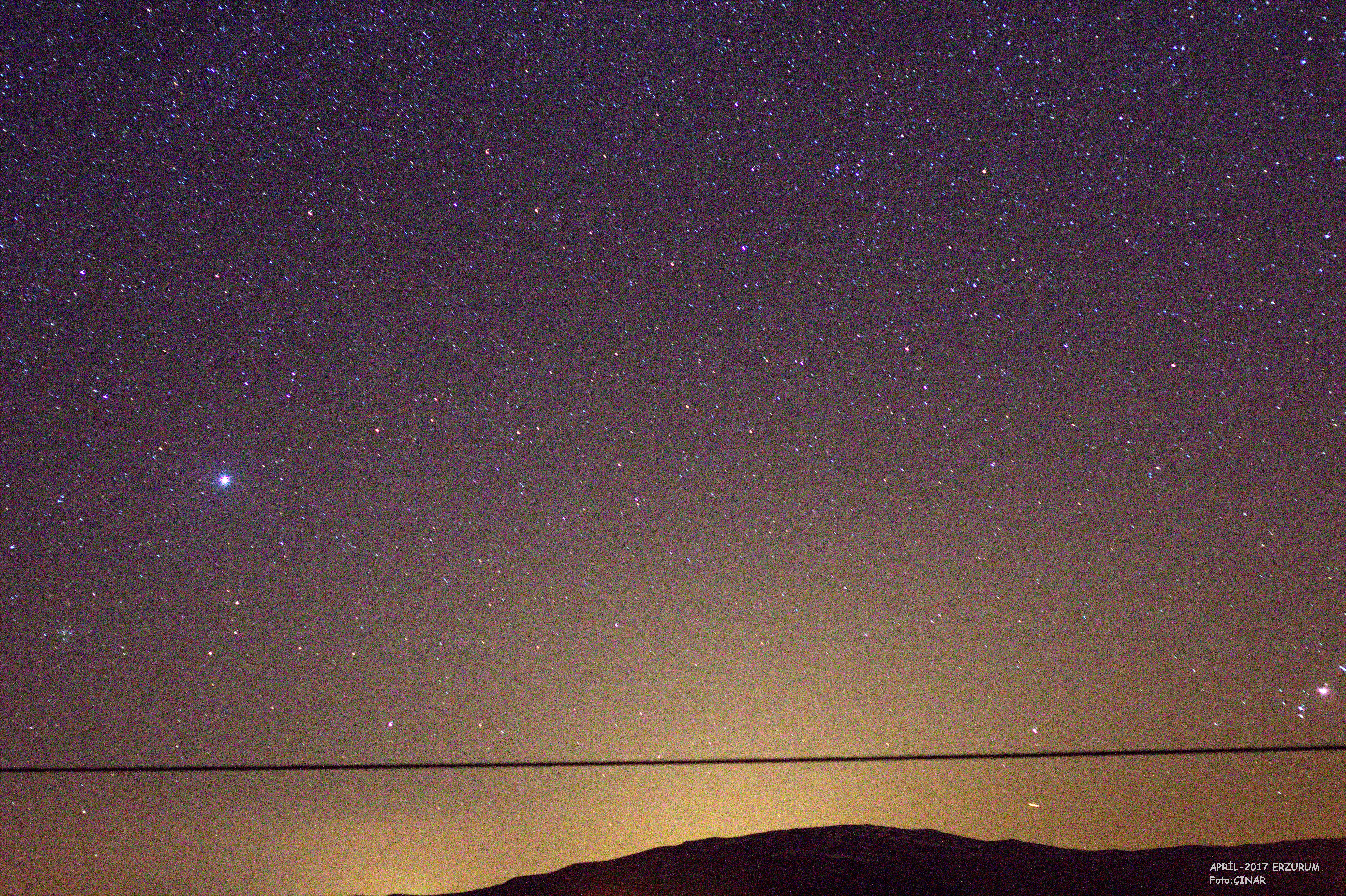 Erzurum'da akşam vakti zodyak ışığı (26 Nisan 2017)